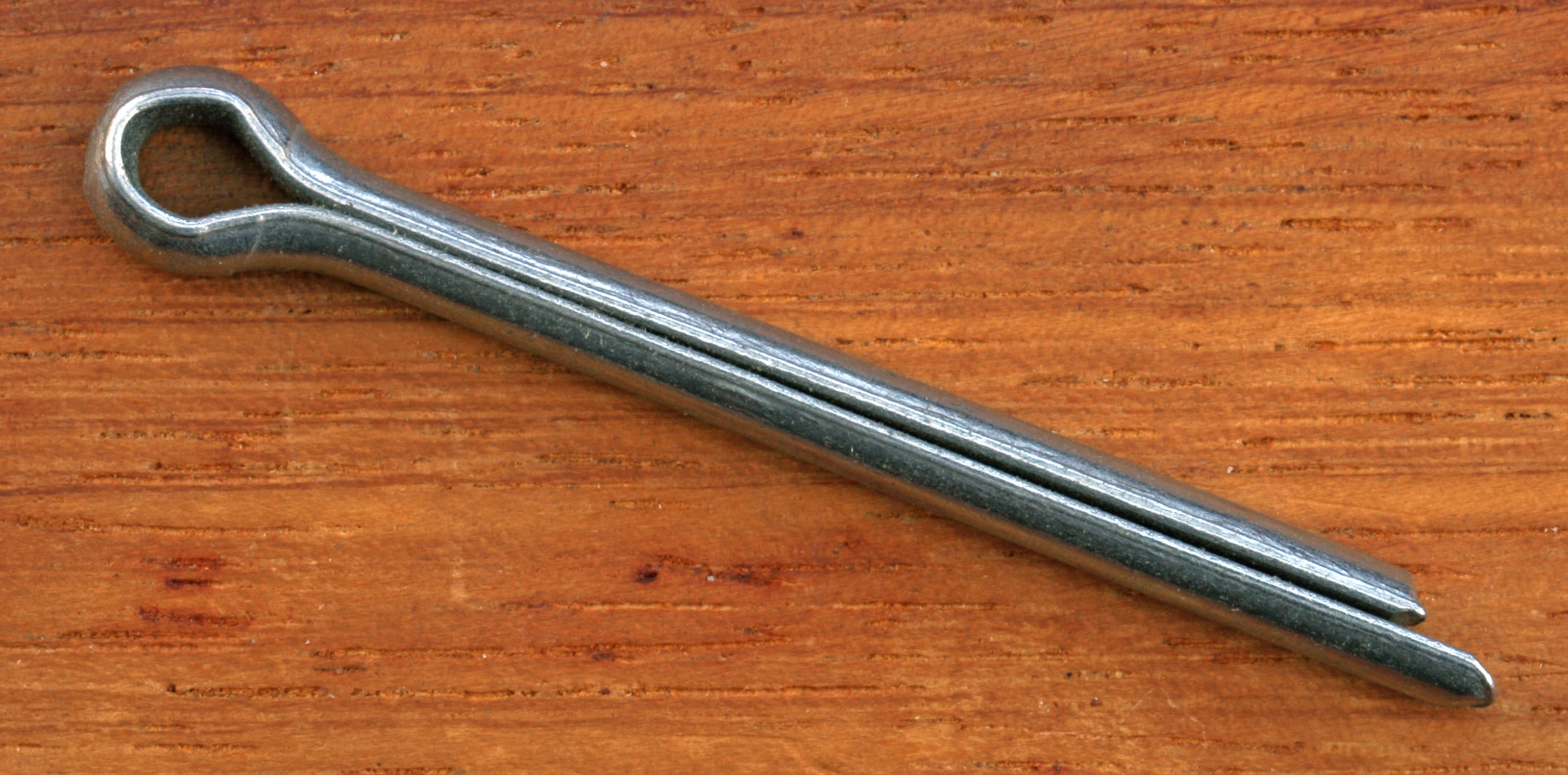 E Splënt.